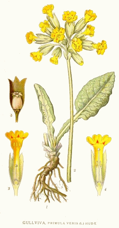 Original Description Gullviva, Primula veris (L.) Huds.